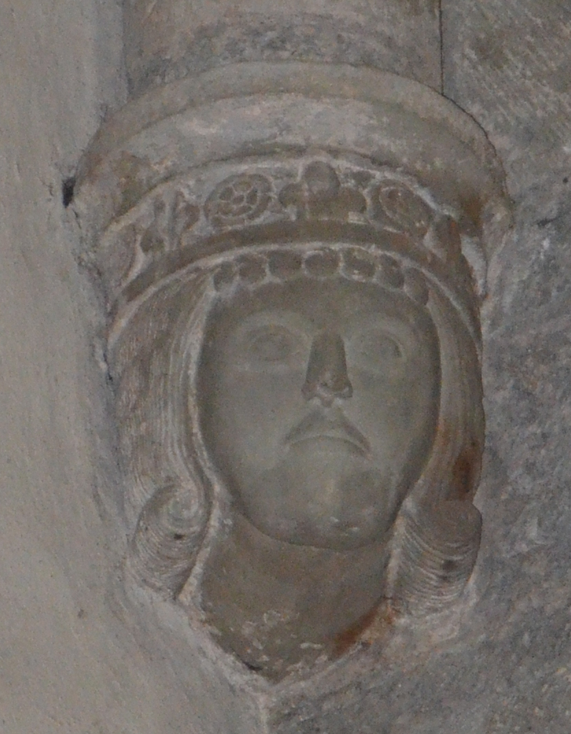 Plastik von Birger Jarl (Birger Magnusson von Bjälbo) in der Klosterkirche Varnhem